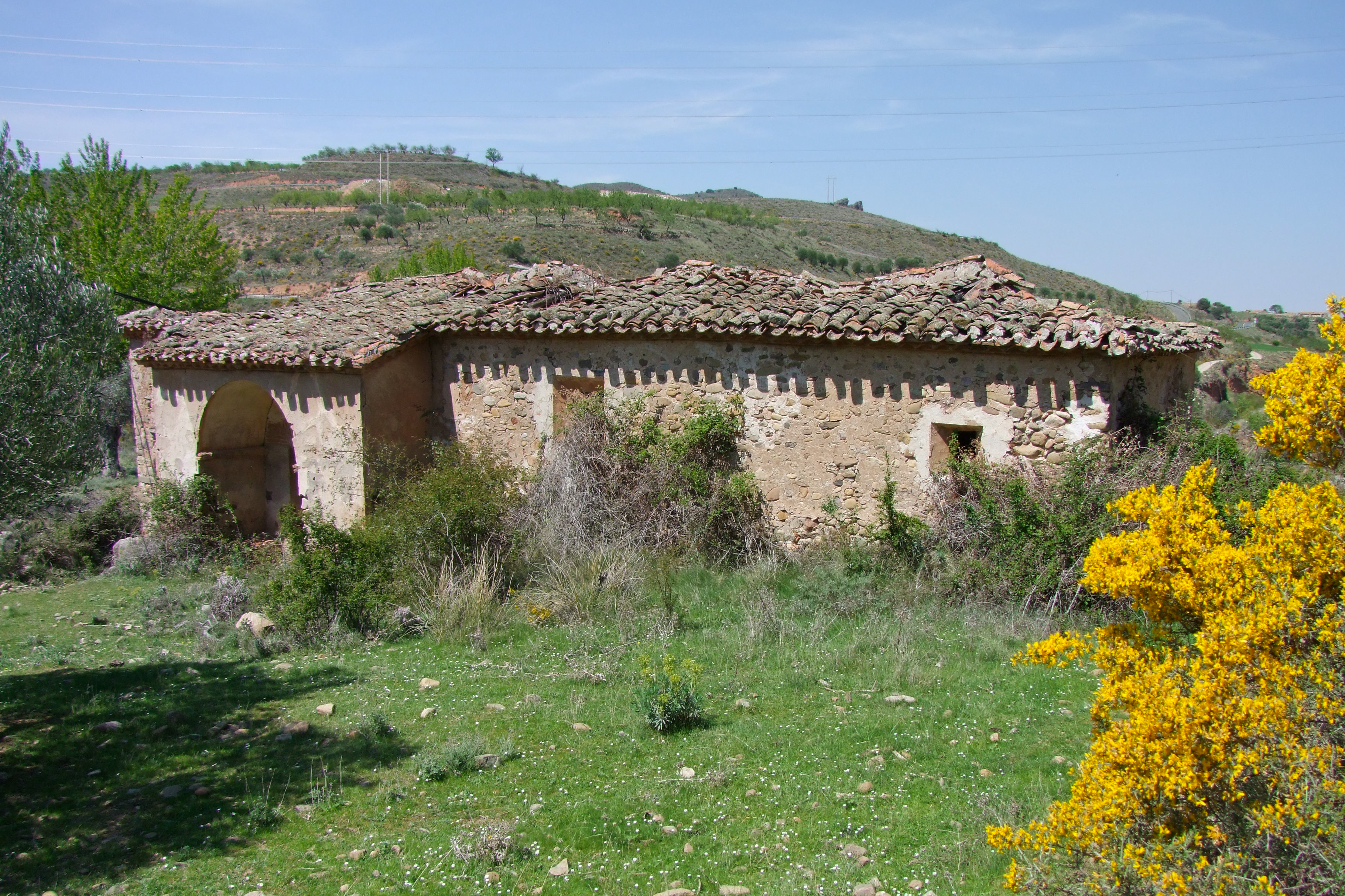 Ermita de San Miguel Arcángel en la localidad de Jubera La Rioja - España